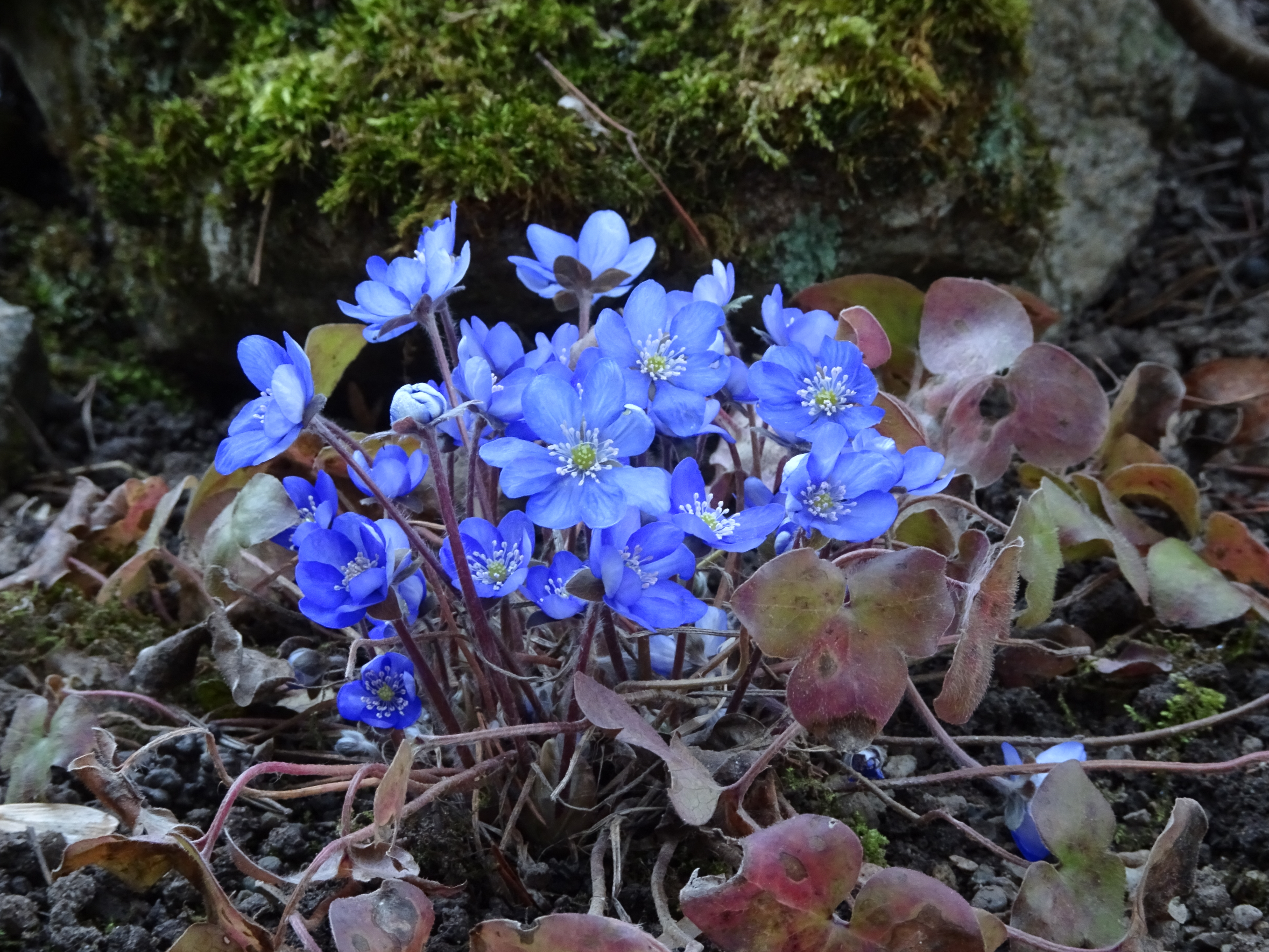 Der „Ermschwerder Heegen“ ist eine, in das untere Tal der Werra hineinragende Erhebung aus Muschelkalk im nordhessischen Werra-Meißner-Kreis. Er erstreckt sich über eine Höhenlage von 132 bis 235 m und besteht aus einem bewaldeten Bereich, einem Feuchtgebiet, Kalkmagerrasen, Streuobstbeständen und landwirtschaftlich genutzten Flächen. Wegen seinem artenreichen Altholzbestand und einem großen Sumpfbiotop mit dem Vorkommen seltener Pflanzen-, Insekten- und Vogelarten wurde der „Heegen“ im Dezember 1985 als Naturschutzgebiet ausgewiesen und später, mit gleichen Gebietsgrenzen und Erhaltungszielen, als Flora-Fauna-Habitat-Gebiet Teil des europäisch vernetzten Schutzgebietssystems „Natura 2000“.